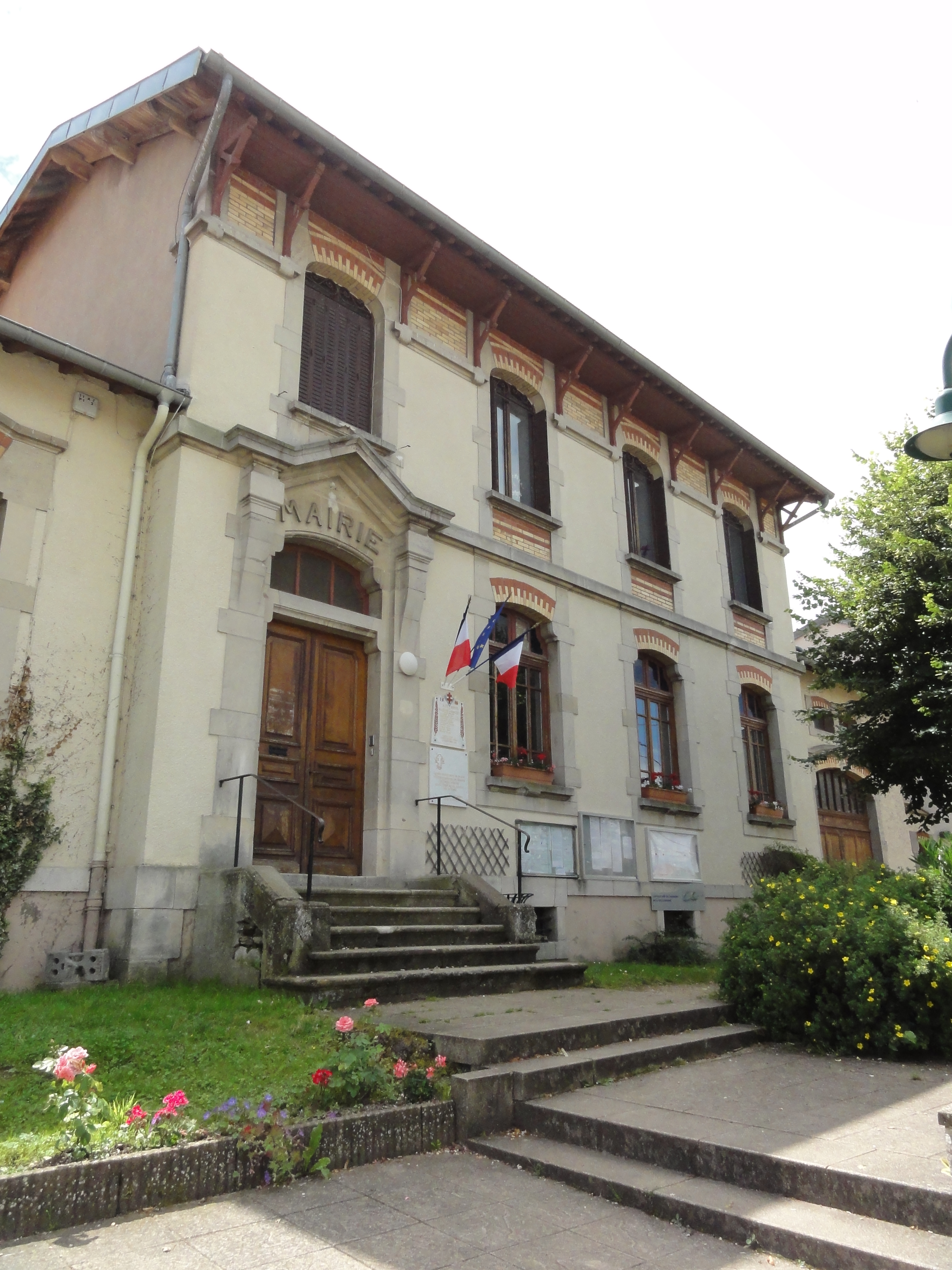 Sornéville (M-et-M) mairie